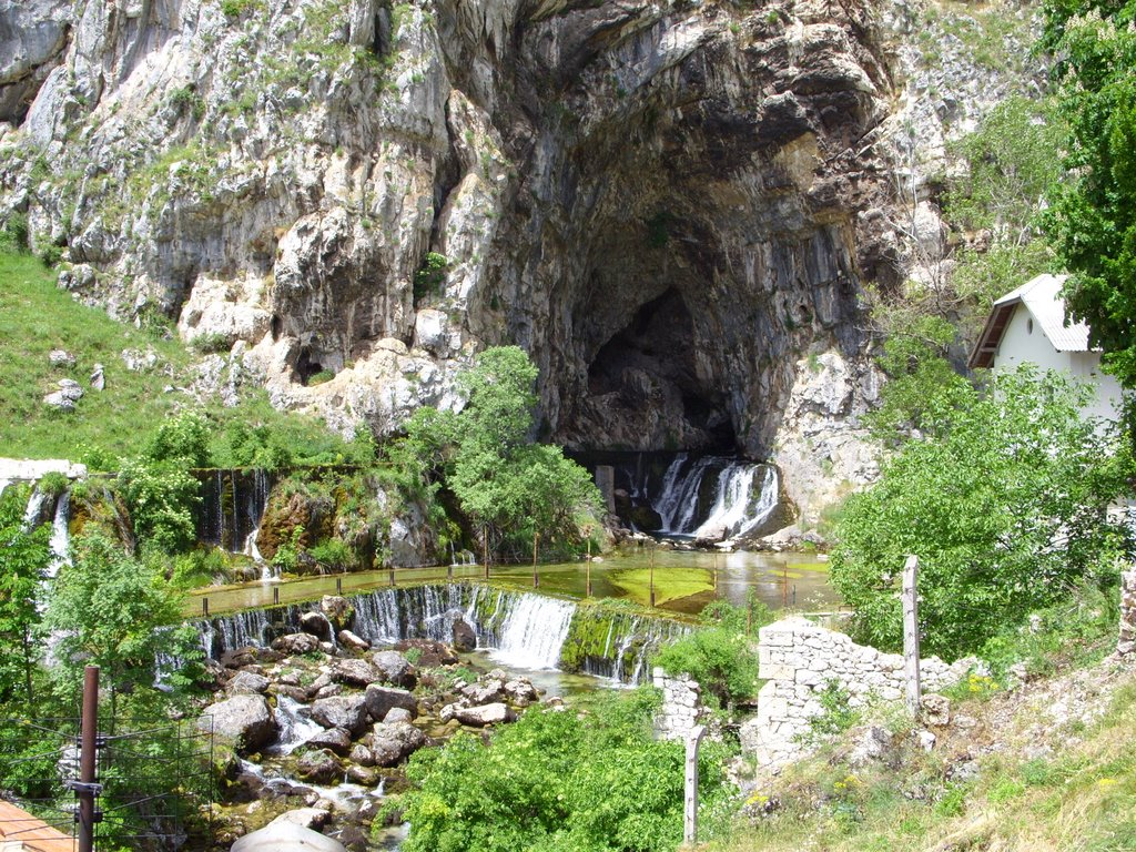 Izvor Bistrice, Livno